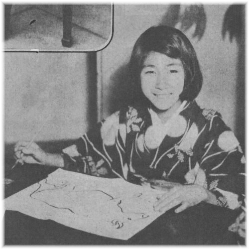 小村寿太郎（1855-1911）の孫娘